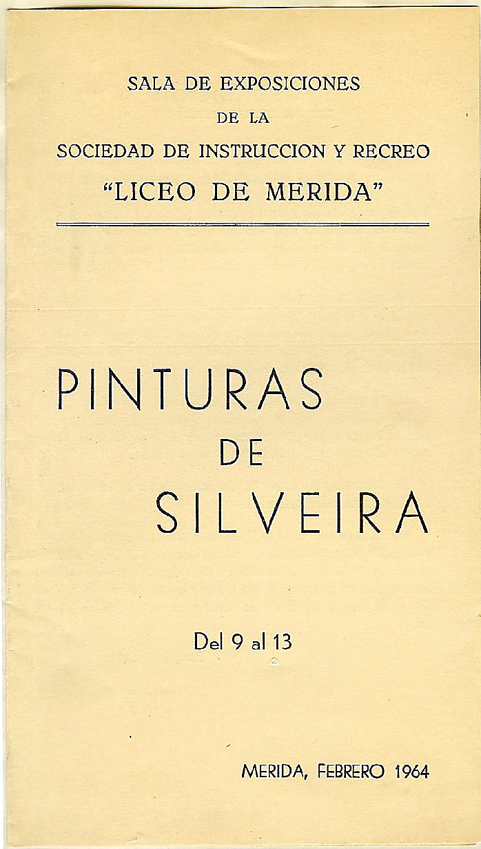 Díptico de la exposición "Pinturas de Silveira". Sala de exposiciones de la Sociedad de Instrucción y Recreo Liceo de Mérida (Badajoz), 9-13 de febrero de 1964. p. 1. Guillermo Silveira García (1922–1987) Description painter, sculptor, military personnel and art educatorDate of birth/death 11 January 1922 11 May 1987Location of birth/death Segura de León BadajozWork periodcirca 1945-1987Work location BadajozAuthority control : Q5888937 VIAF: 100940319 ISNI: 0000 0000 7827 0108 GND: 139488154 BNE: XX4841676 creator QS:P170,Q5888937